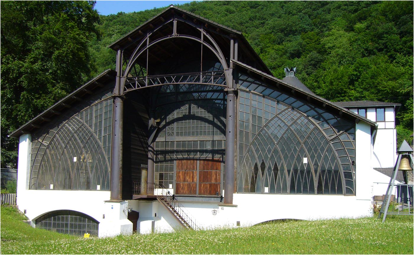 Sayner Hütte, Gießhalle